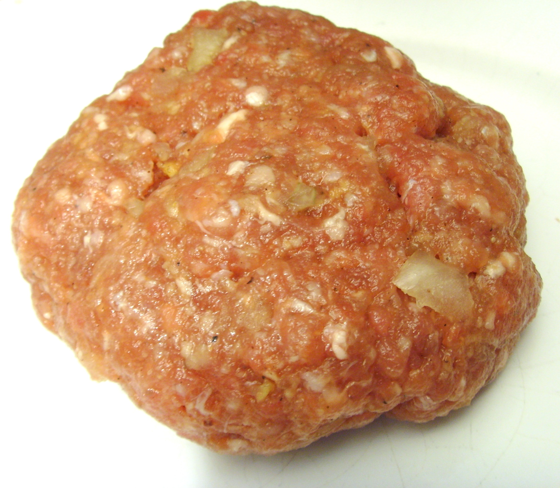 Hackfleisch fleischklops fleisch gehacktes